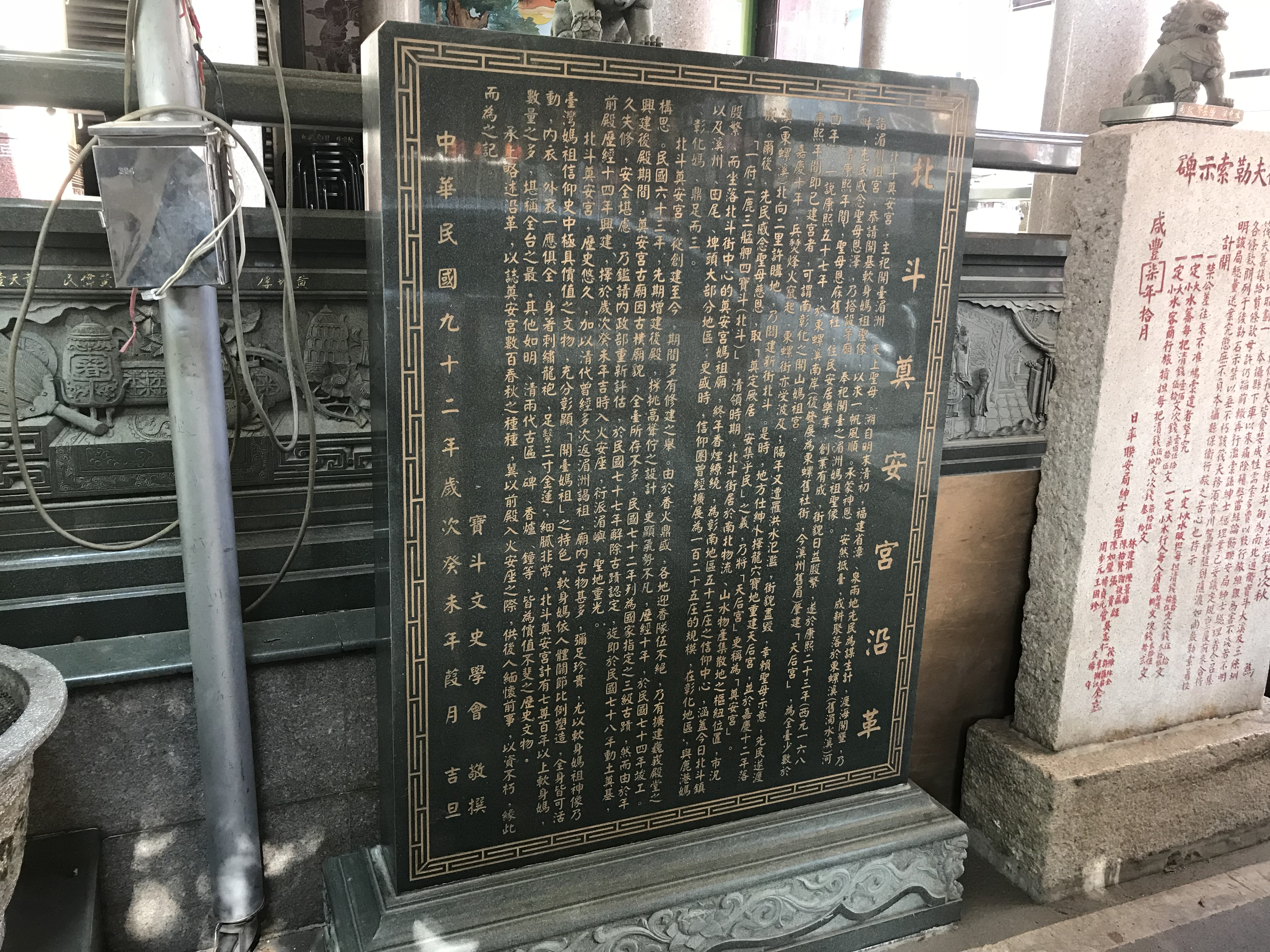 北斗奠安宮沿革碑